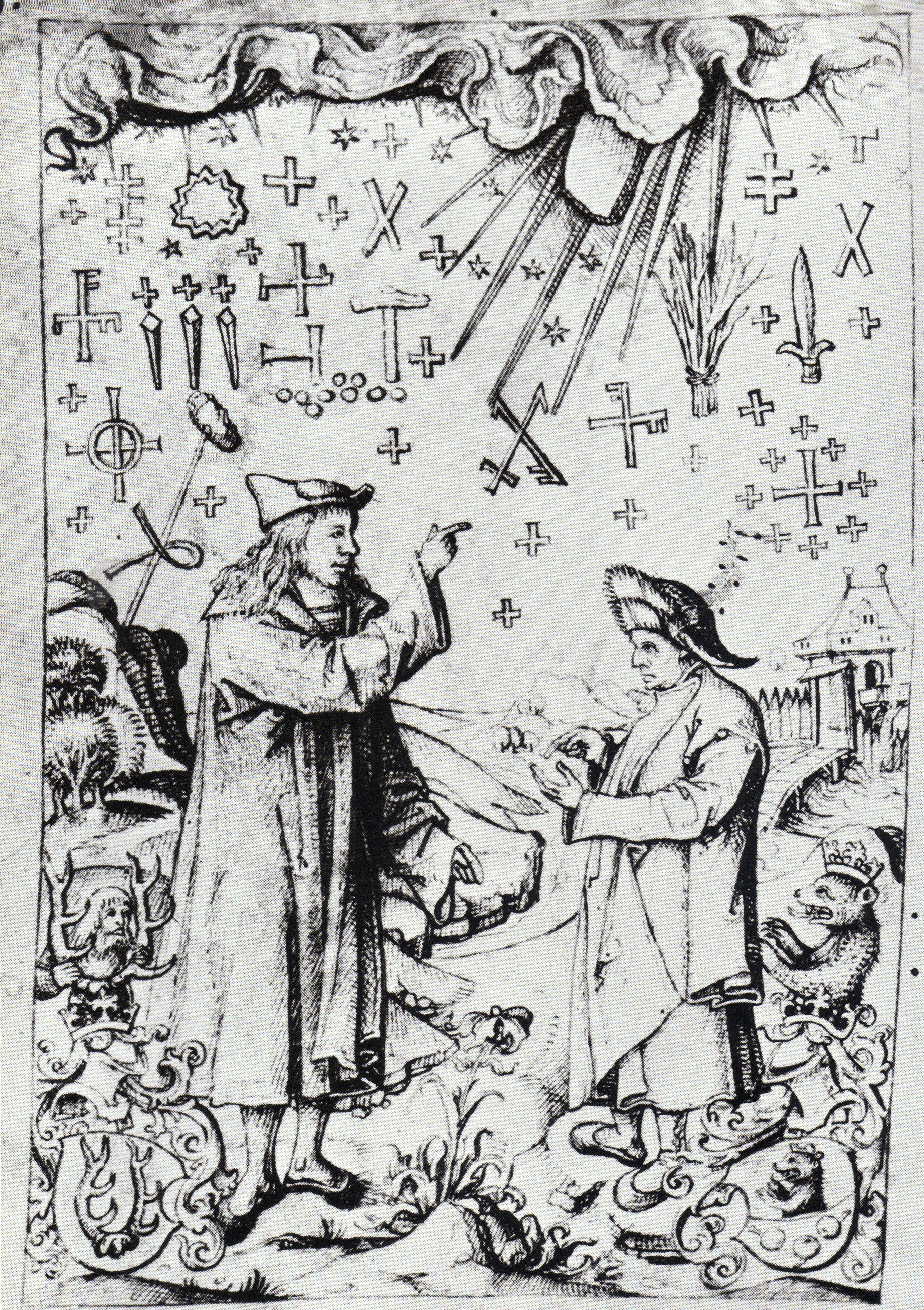 Joseph Grünpeck: Prodigiorum ... interpretatio. Federzeichnung UB Innsbruck Hs. 314: Grünpeck links deutet Blasius Hölzl Wunderzeichen